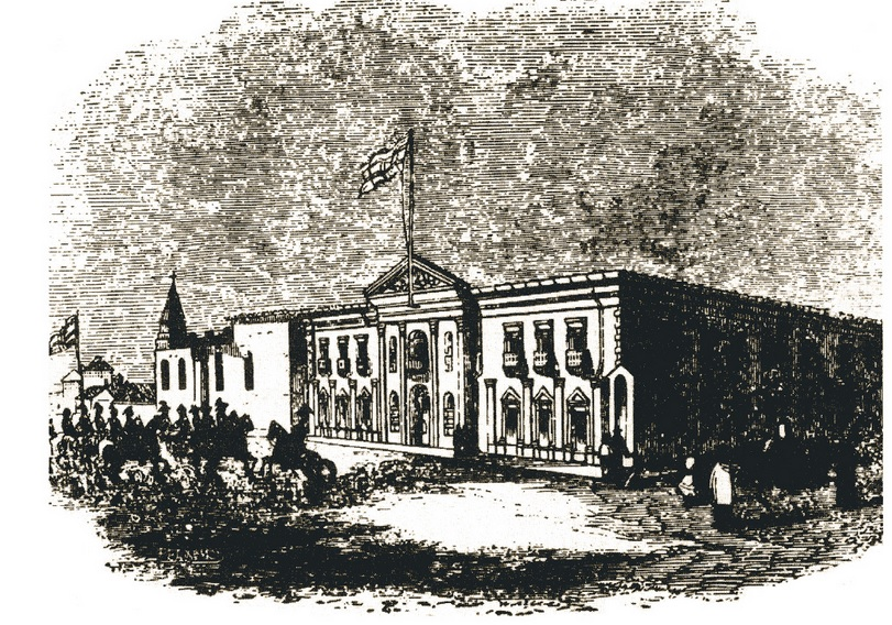 Palacio Nacional de Costa Rica (1858).